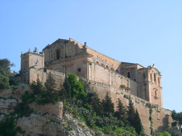 AUTORE: Claudio Zisa DESCRIZIONE: La Chiesa di San Matteo a Scicli (RG) LICENZA D'USO: pubblico dominio